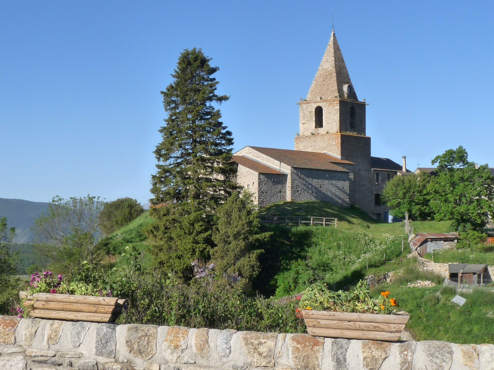 Eglise de Bolquère, P.O., France